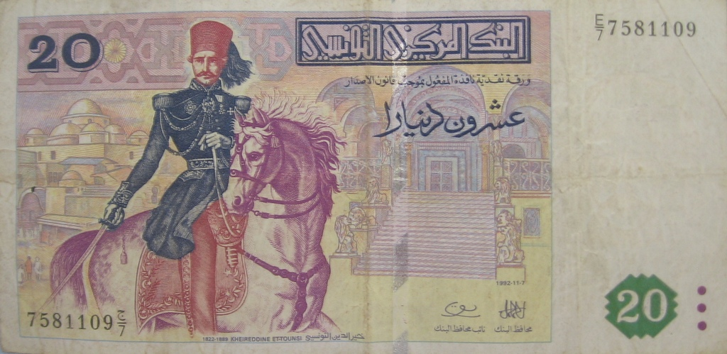 20 dinarów tunezyjskich - Avers